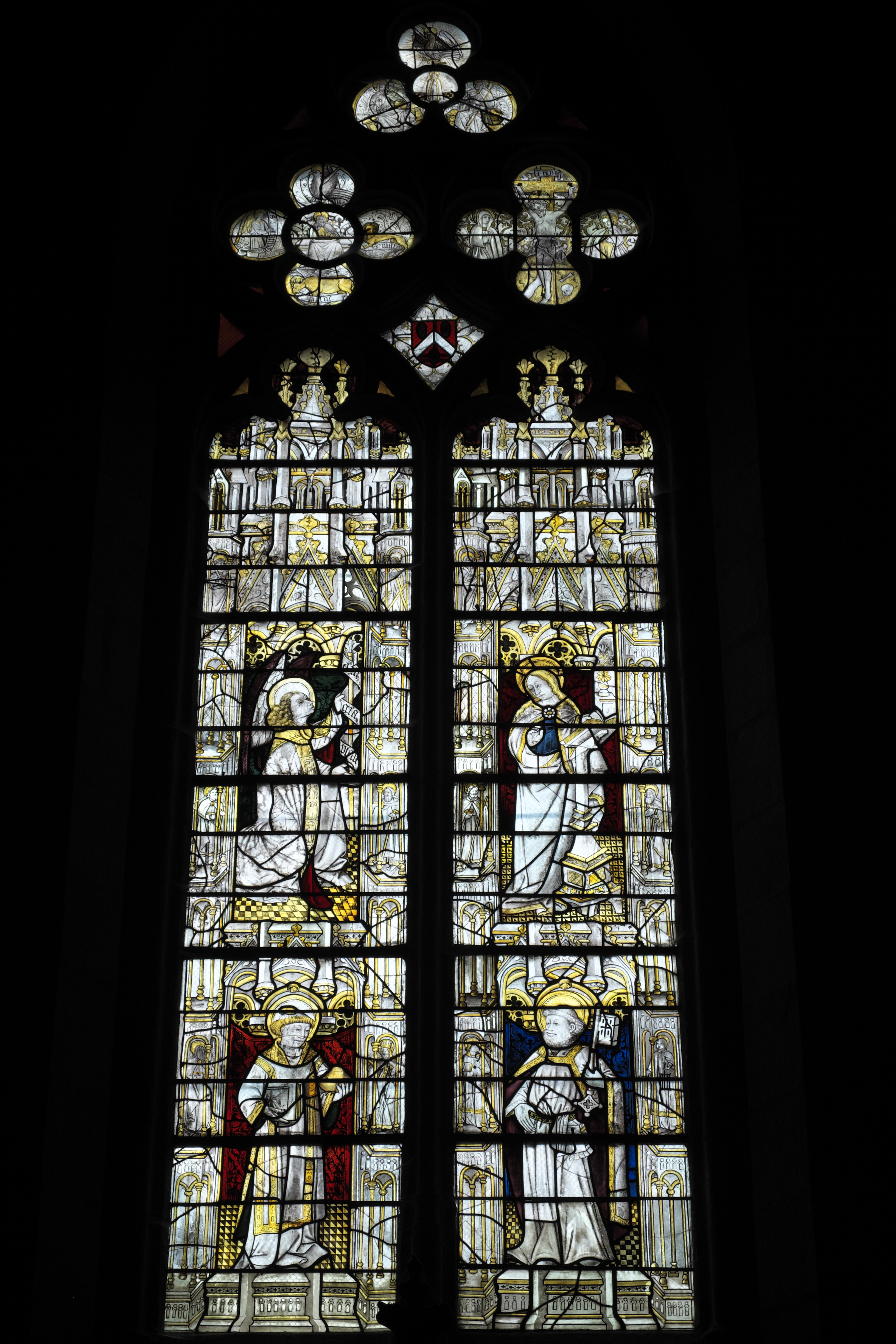 Stiftskirche Saint-Étienne in Eymoutiers im Département Haute-Vienne (Nouvelle-Aquitaine/Frankreich), Bleiglasfenster (Nr. 14) aus dem 15. Jahrhundert, Darstellung: Verkündigung (oben), heiliger Stephanus (unten links), Apostel Petrus (unten rechts)